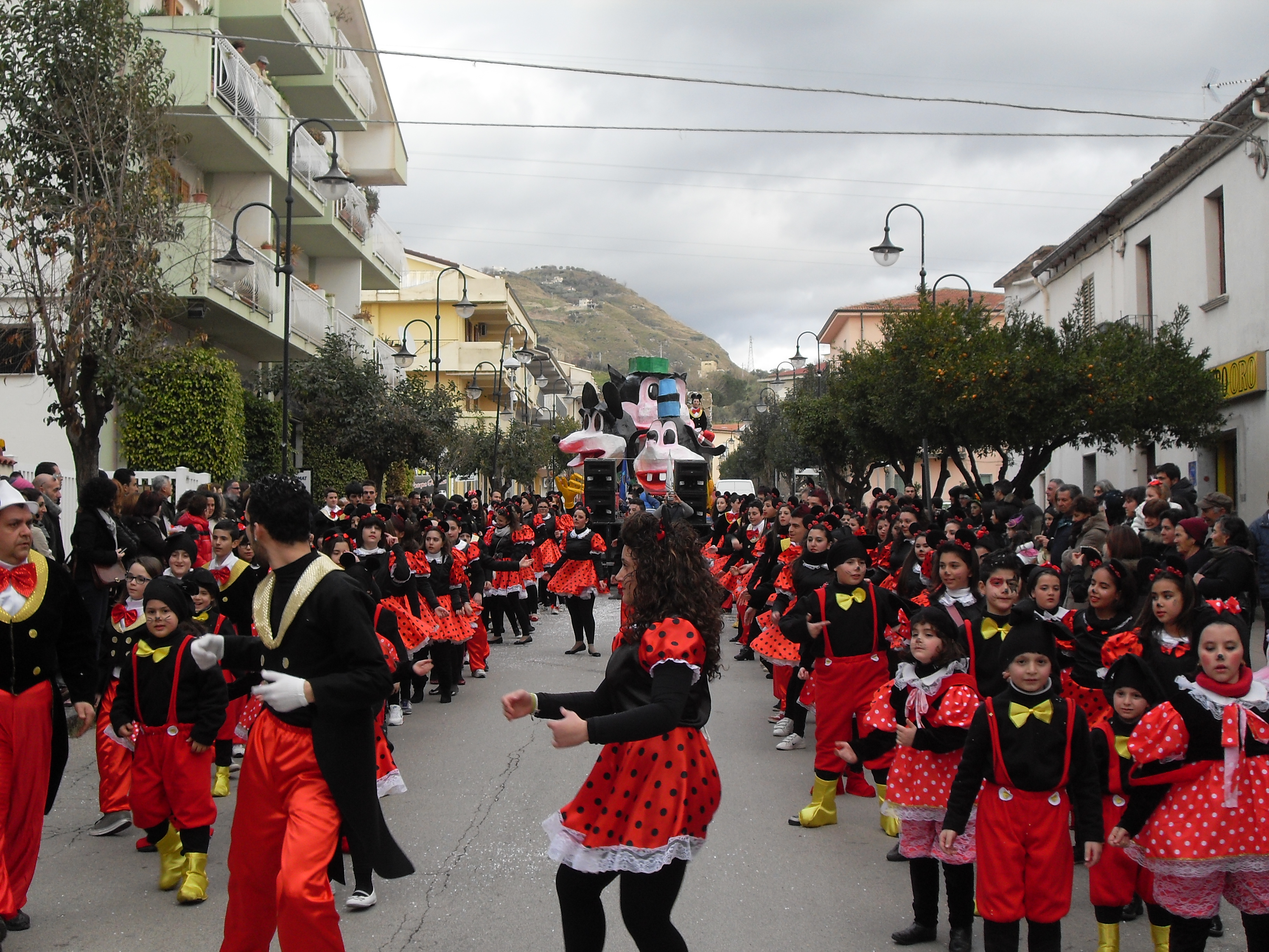 Carnevale di Campora San Giovanni in Corso Italia, nell'Edizione 2012